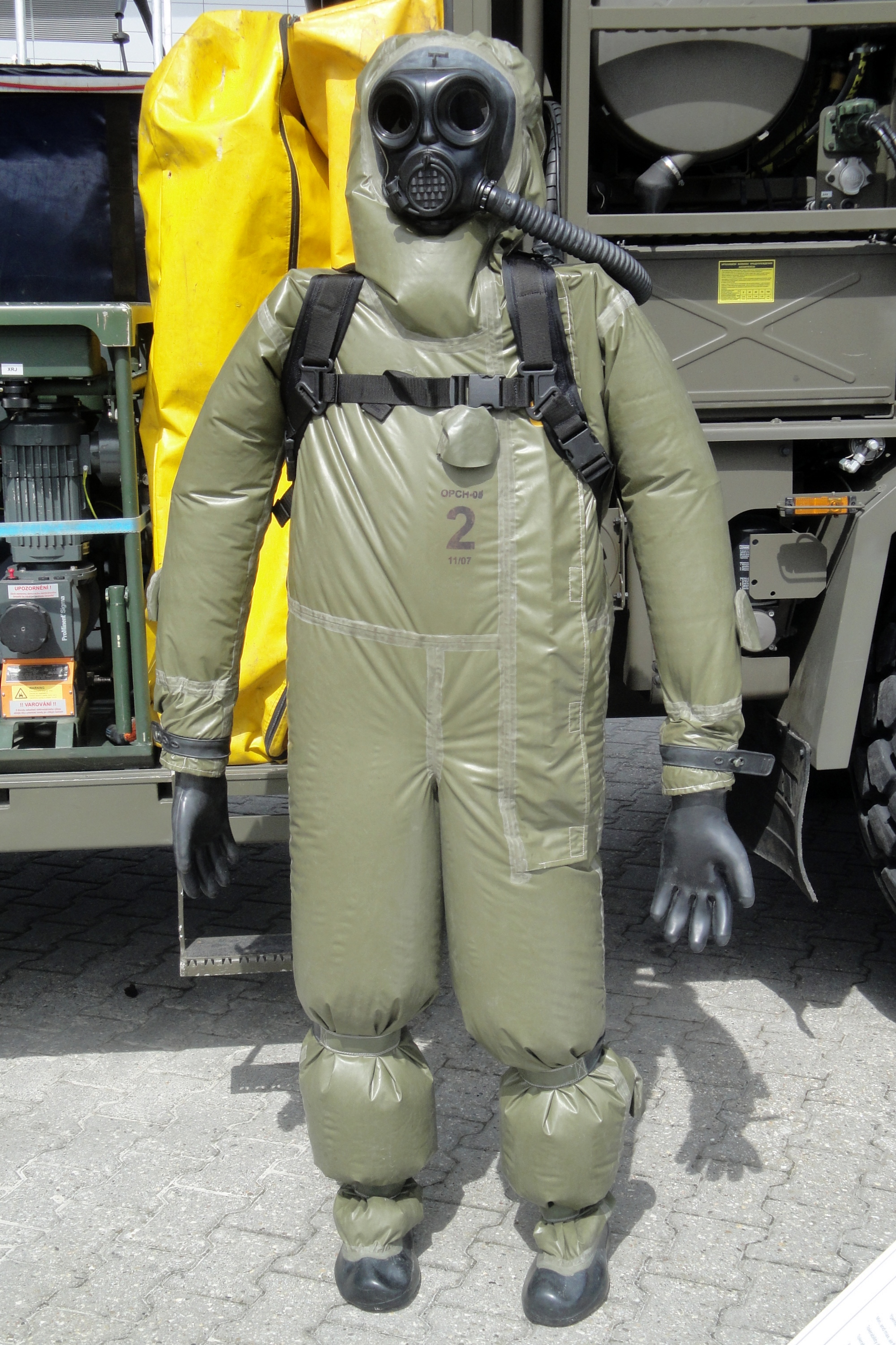 Schutzanzug, IDET/PYROS/ISET 2019, Brünn